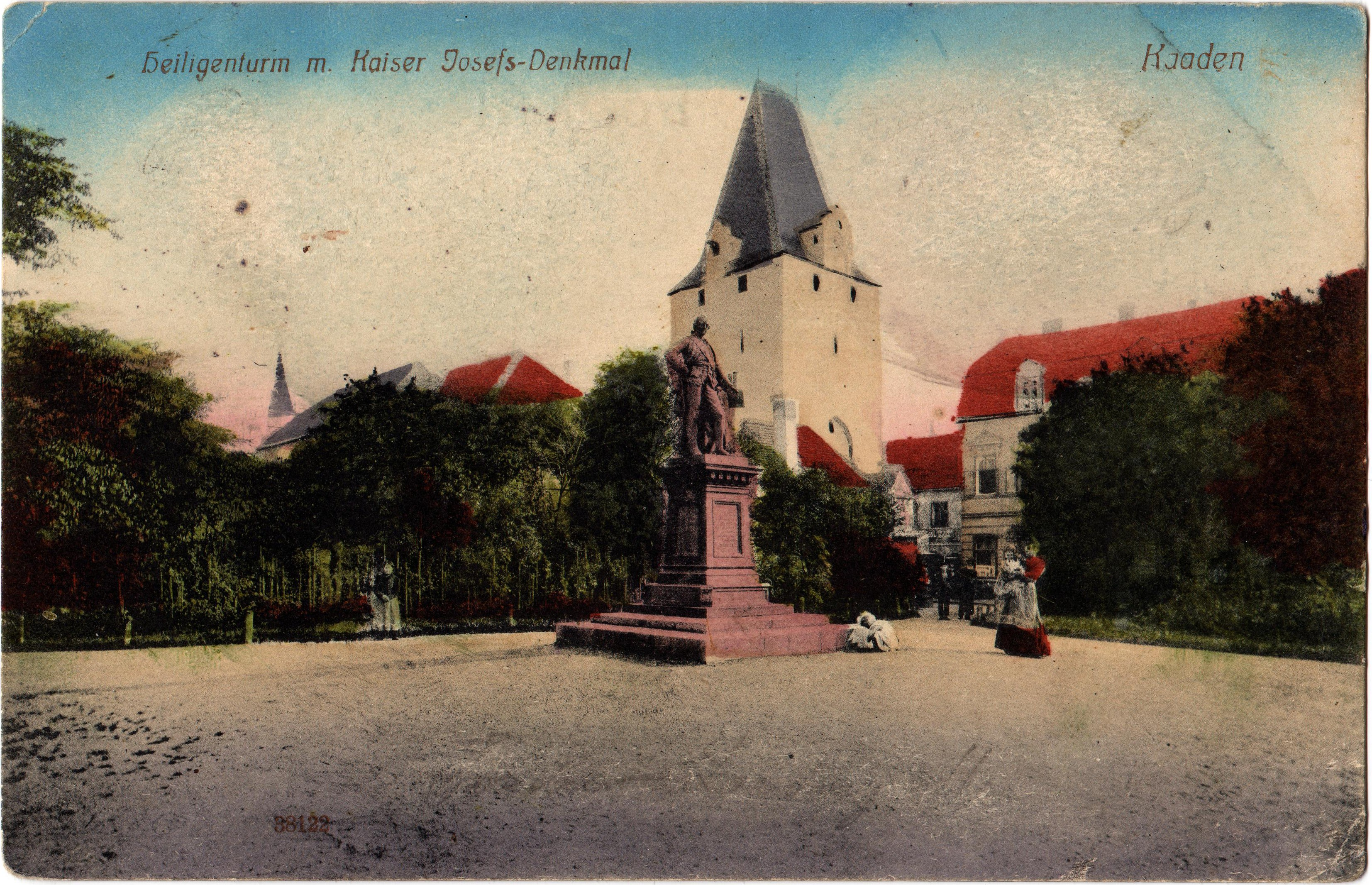 Kadaň, Josefské náměstí, kolem roku 1900; dnes Studentské náměstí